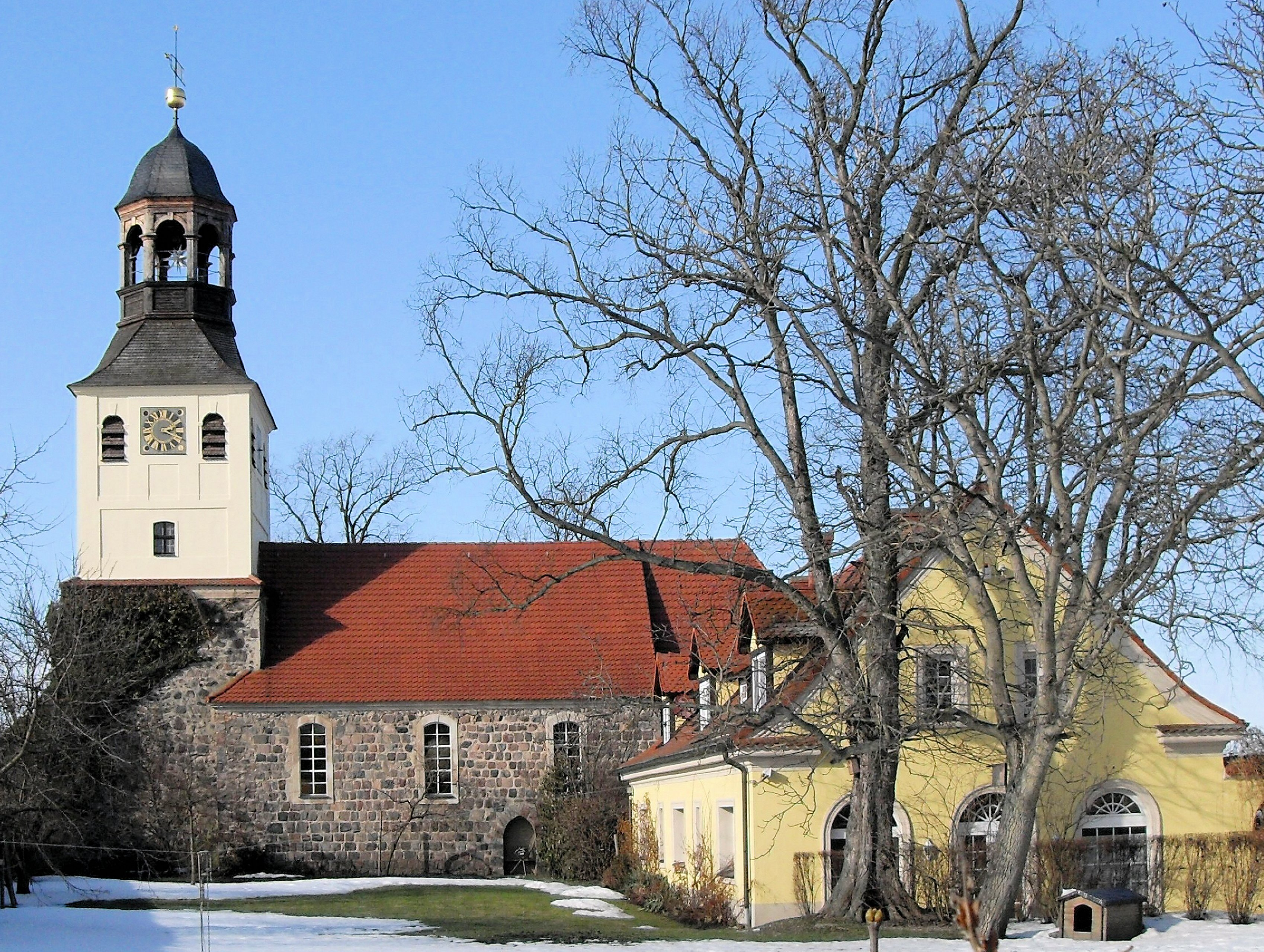 Kirche in Friedersdorf, Gemeinde Vierlinden, Deutschland